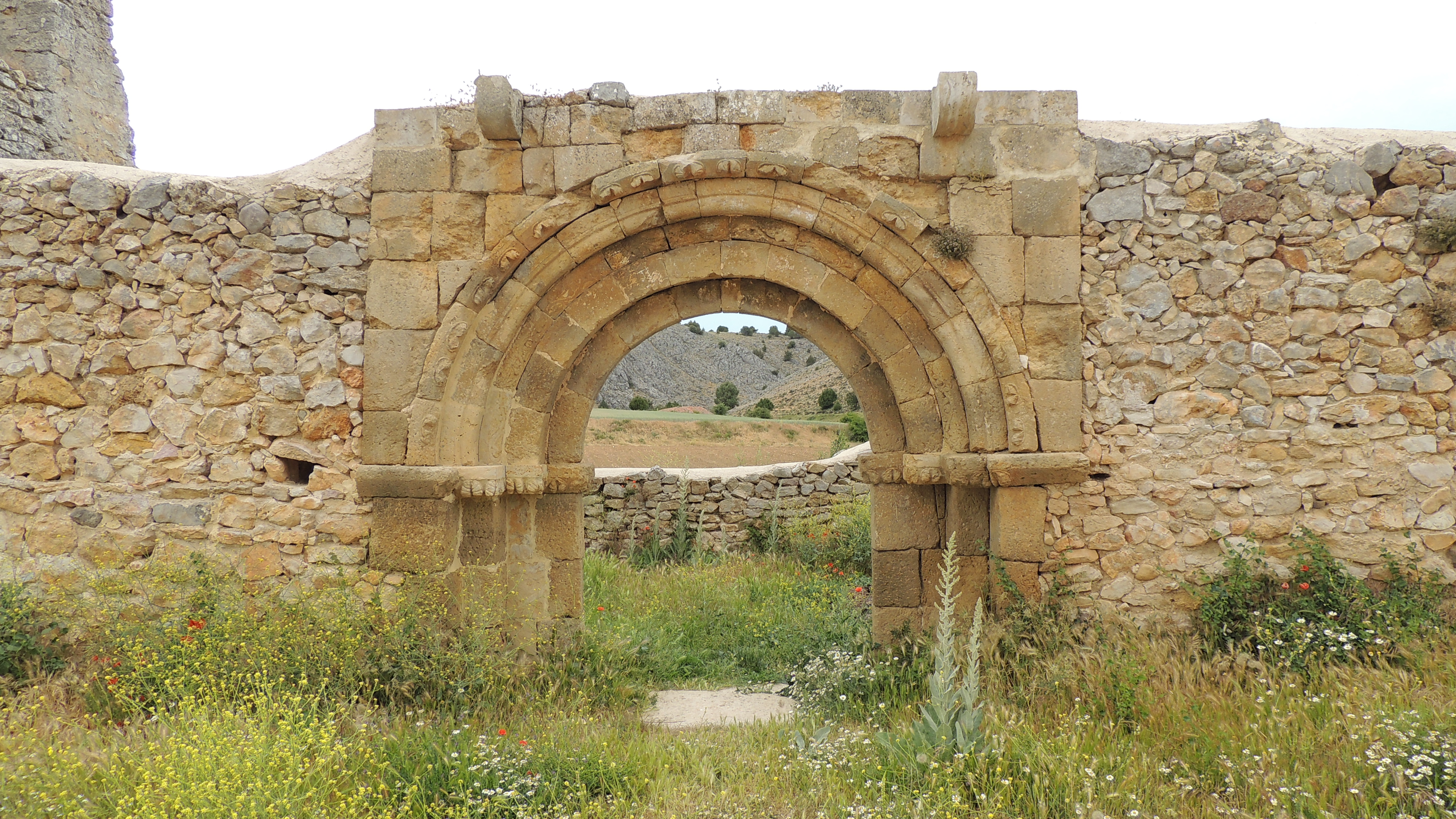 Iglesia de San Juan de Calatañazor